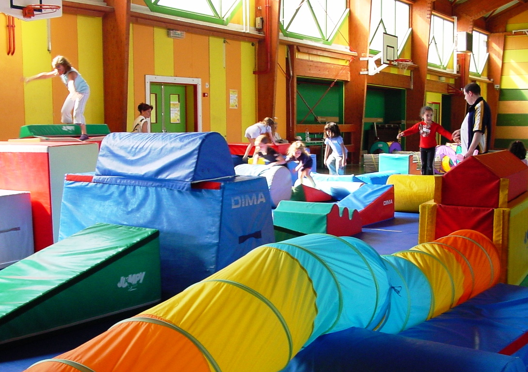 Gymnase d'Argenteuil aménagé pour pratique des tous-petits, photo prise par moi-même (appareil cubershot Sony)